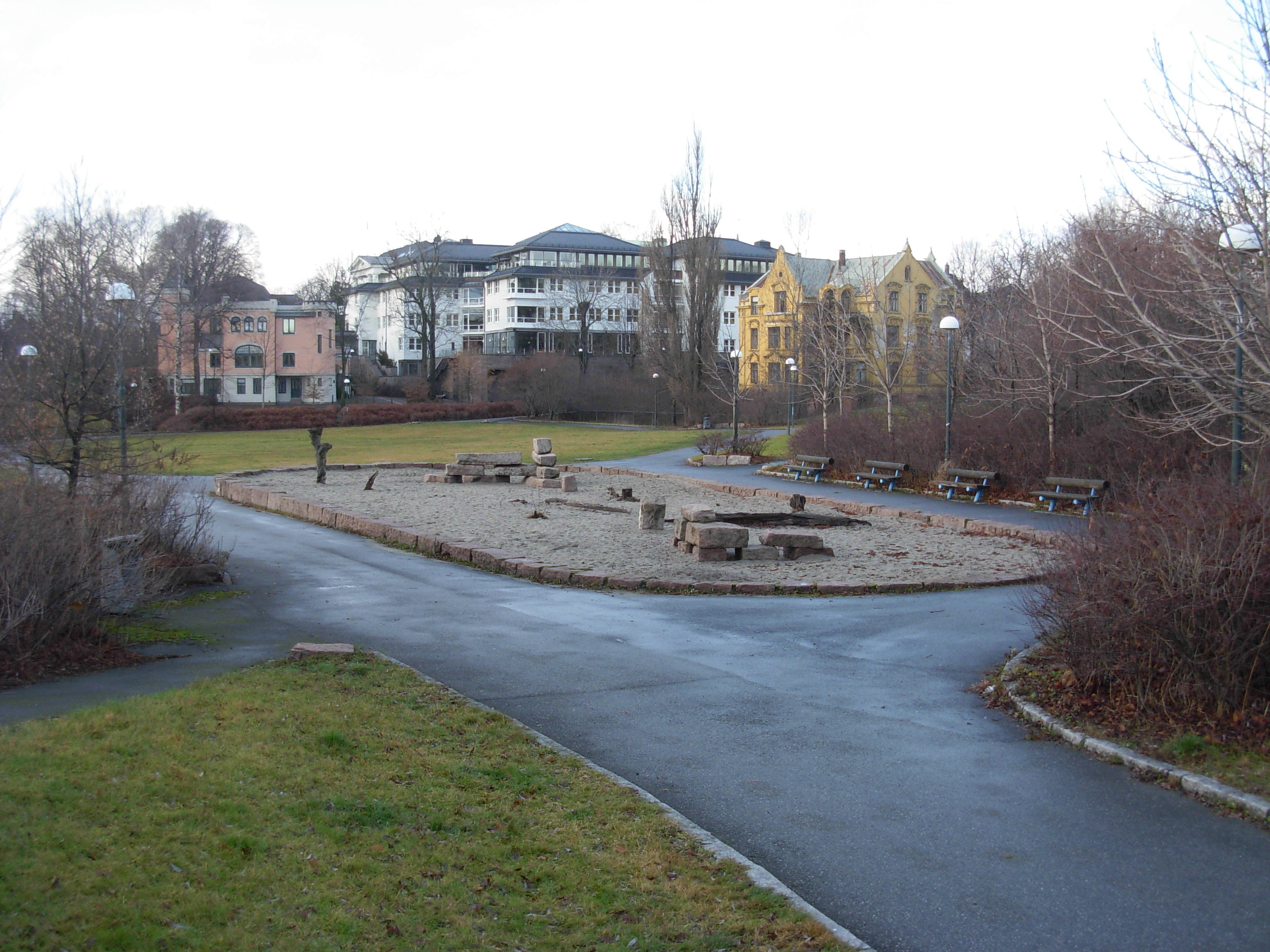 Frøyas have (park), Skarpsno, Oslo